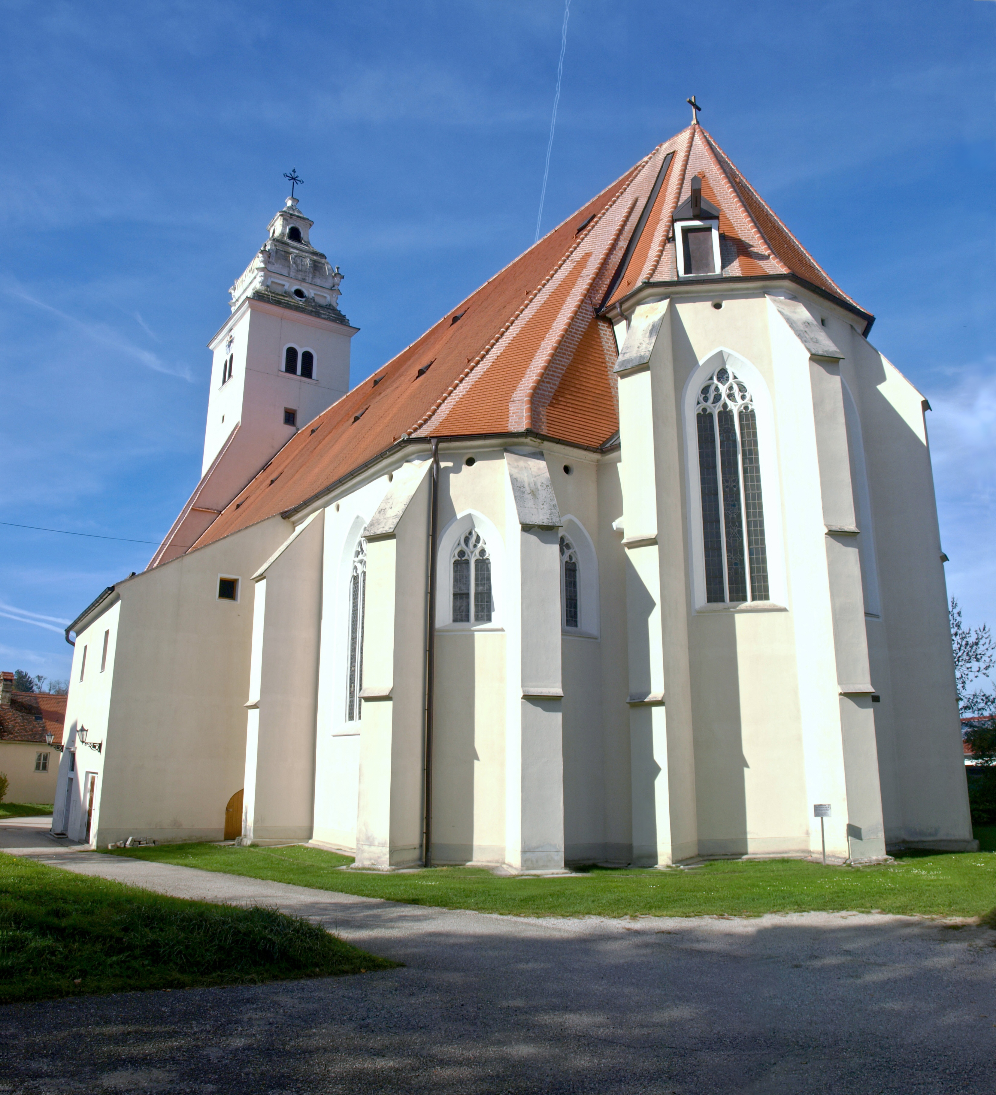 Kath. Pfarrkirche hl. Simon und Judas